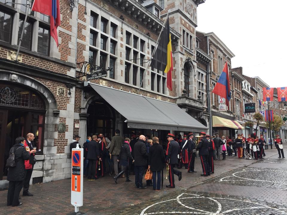 Museum van schutterij / kloveniersgilde "Compagnie royale des Anciens Arquebusiers" in Visé, tijdens de Sint-Martinusviering op 12 november 2017.